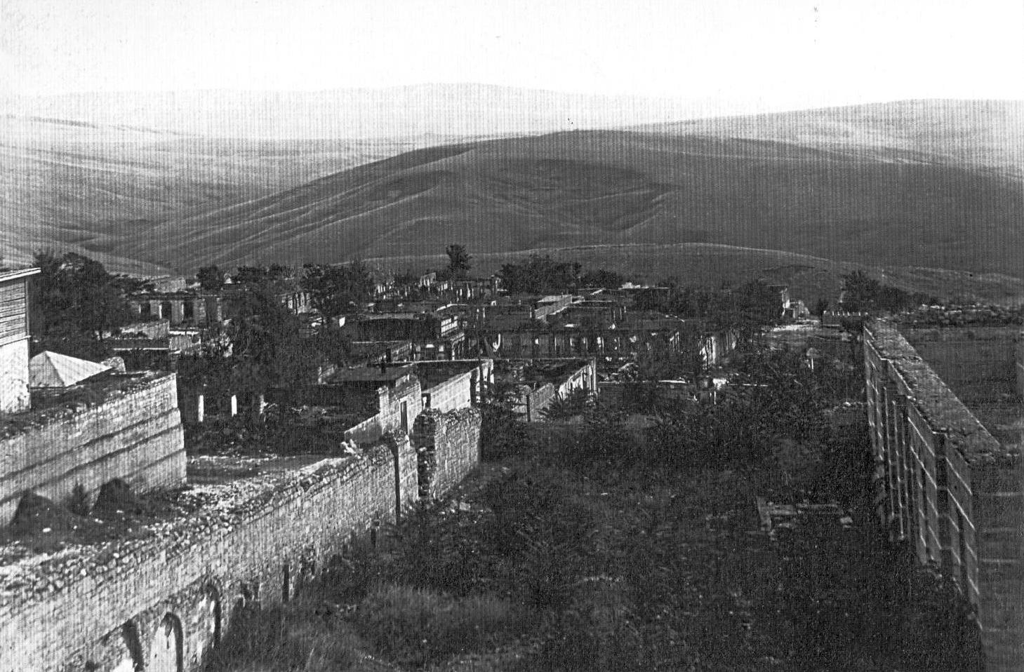 “Pir Şirvan” bölgəsinin qərbdən şərqə doğru ümumi mənzərəsi